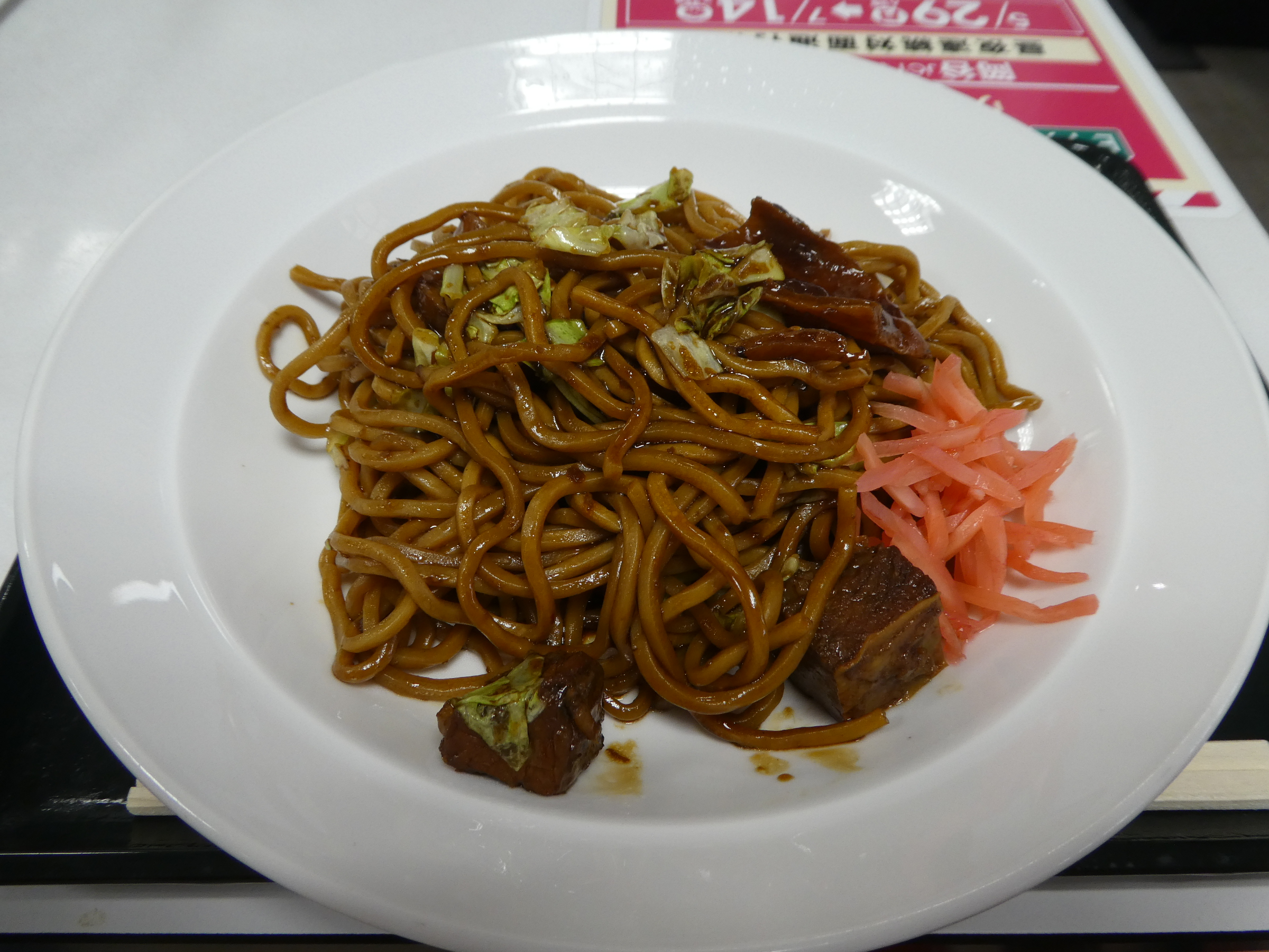 中央自動車道、駒ヶ岳サービスエリア（下り線）の牛すじローメン。